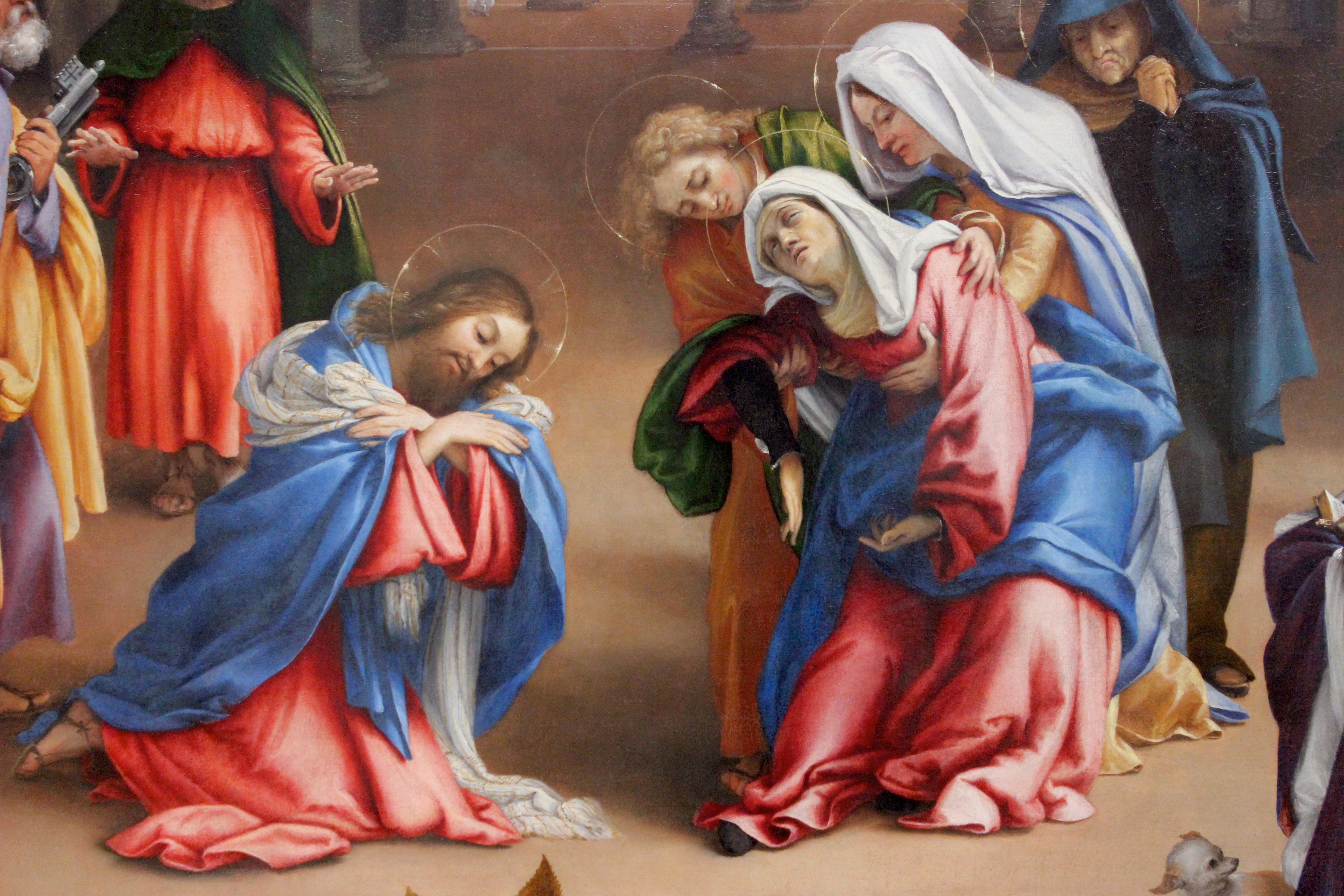 Berlín, Gemäldegalerie. Cristo despidiéndose de su madre. Lorenzo Lotto.